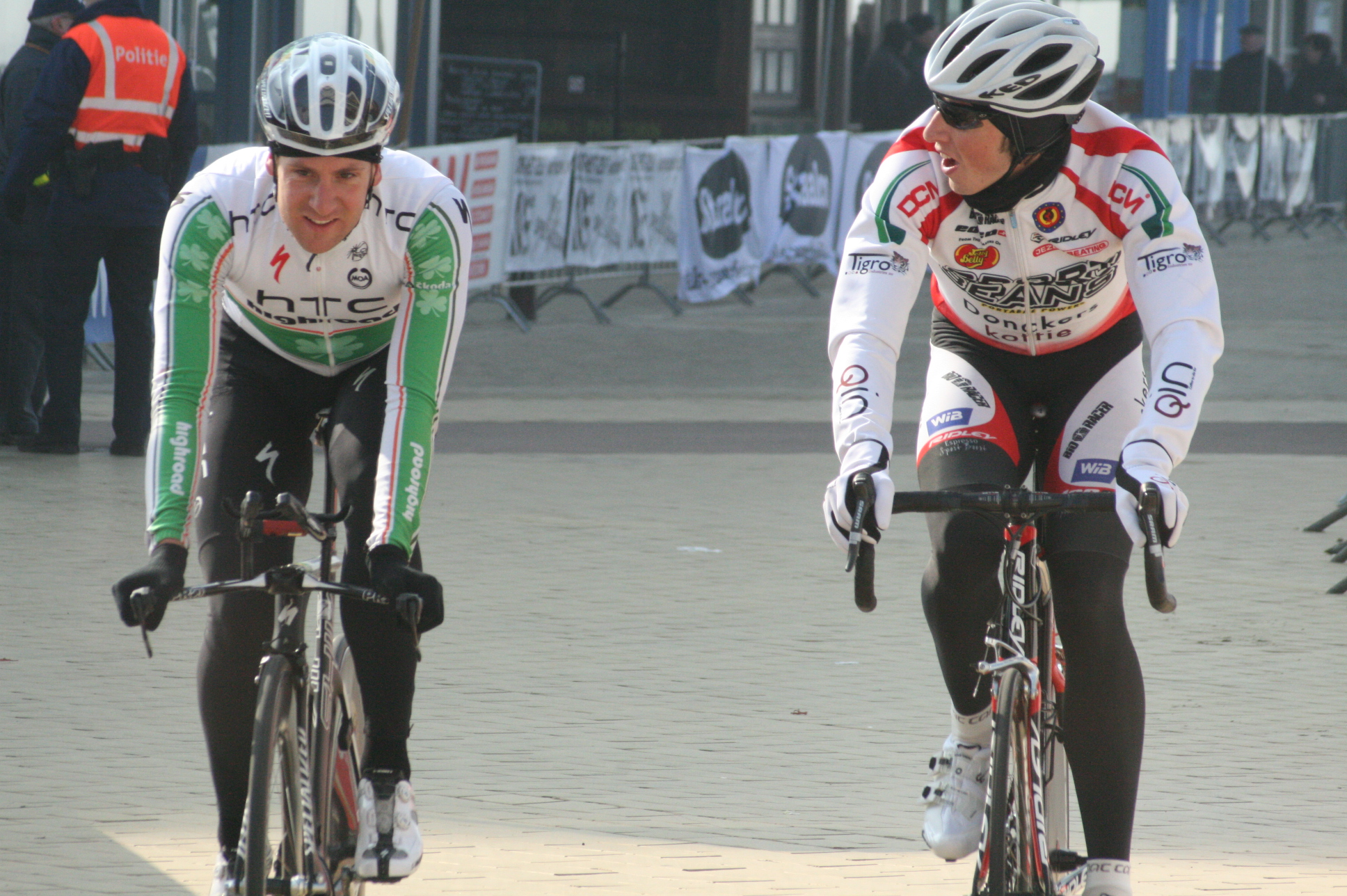 Driedaagse van West-Vlaanderen 2011, proloog in Middelkerke